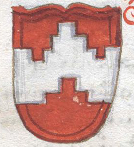 Wappen Salzburger Erzbischöfe aus der Salzburgischen Chronik bis 1587 (für frühe Bischöfe sicherlich apokryph), Universitätsbibliothek Salzburg; Friedrich II. von Walchen